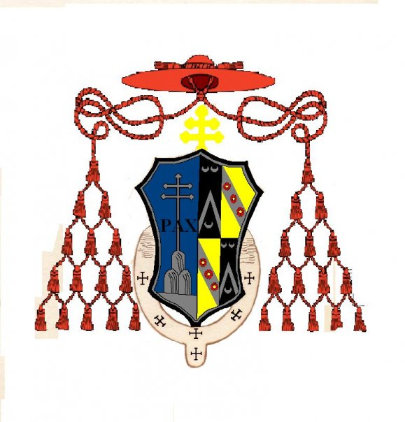 Lo stemma cardinalizio del Beato Giuseppe Benedetto Dusmet